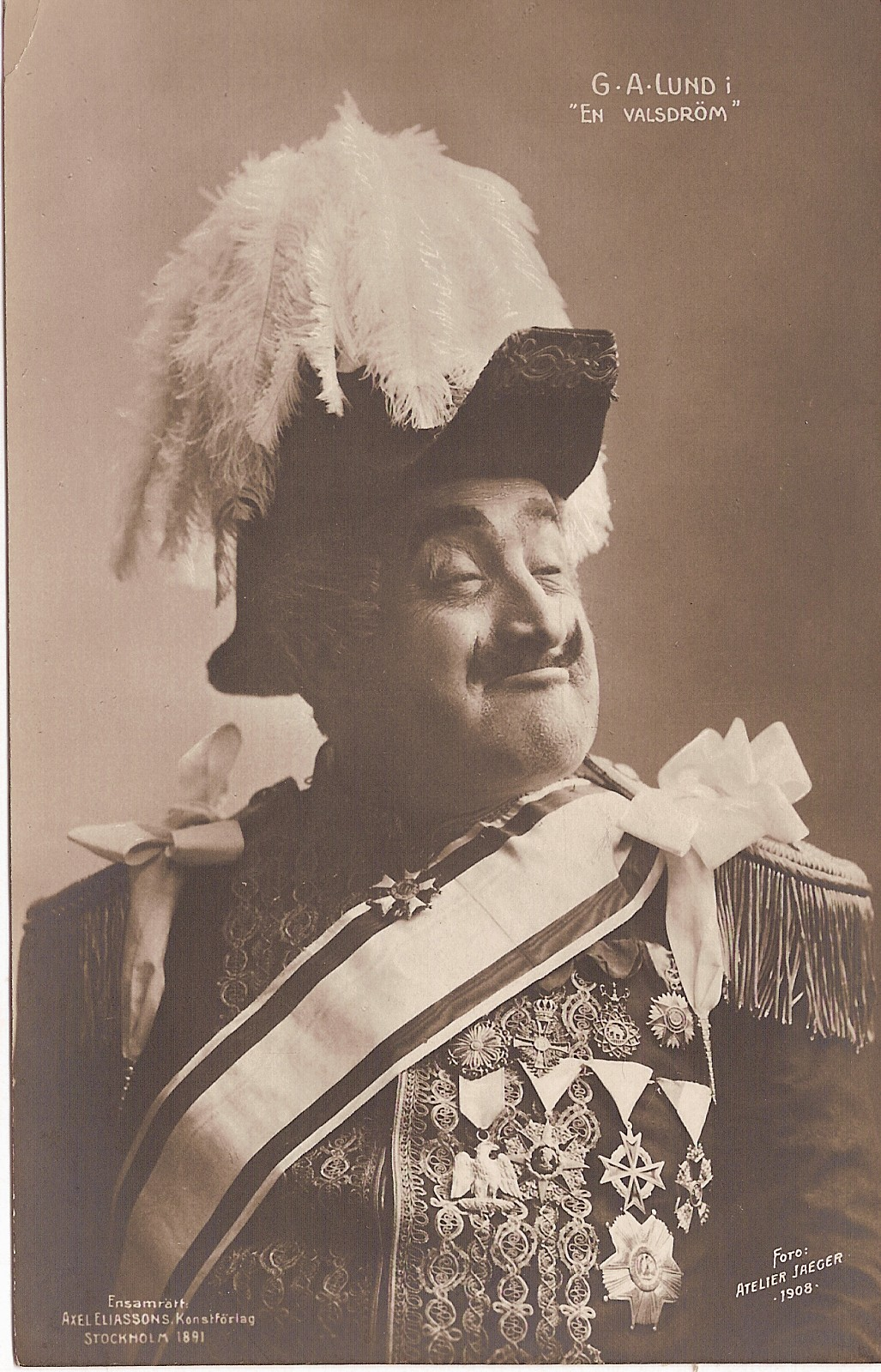 Operettsångaren "Lucke" Lund